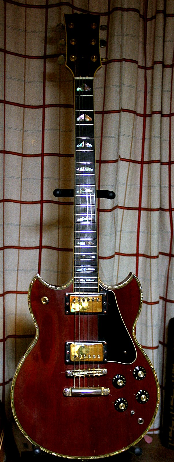 YAMAHA SG175 1976